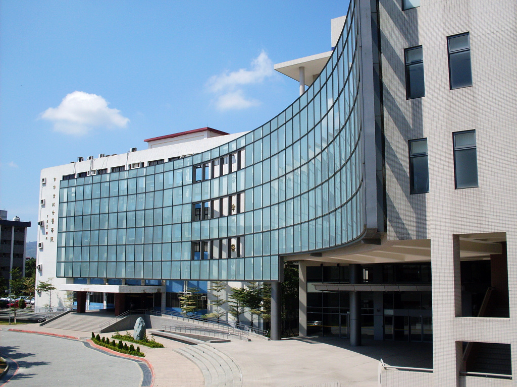 輔大醫學院